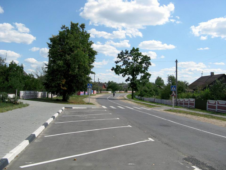 Беларуская (тарашкевіца): Чарнаўчыцы